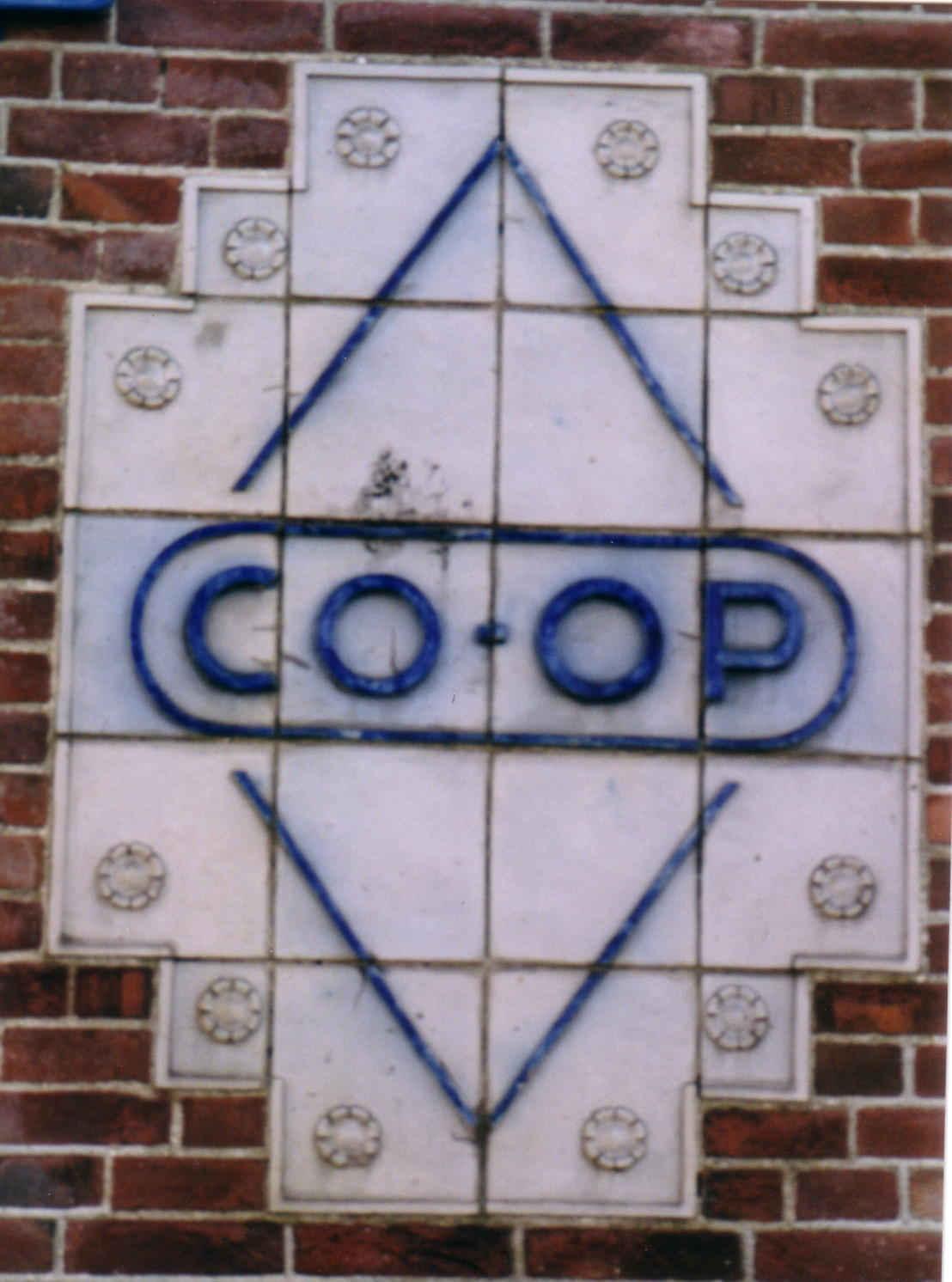 CO-OP tegeltableau, hoek Hendriklaan/Burg. Rauppstraat, Roermond